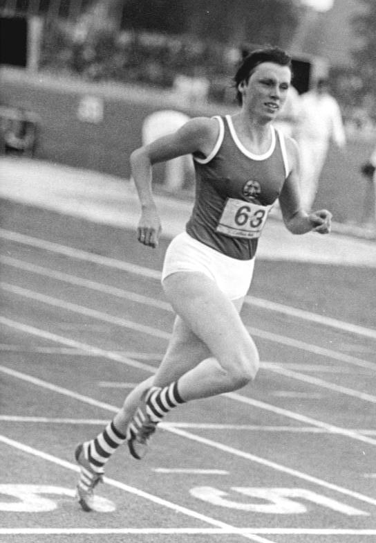 Bärbel Wöckel ADN-ZB Kaufhold 19.7.80 Cottbus-Leichtathletik-DDR-Meisterschaften-Ihren erneuten Anschluß an die Weltspitze stellte Olympiasiegerin Bärbel Wöckel vom SC Motor Jena in den vergangenen Tagen mehrmals unter Beweis. Auf der 200-m-Sprintstrecke siegte sie am 18.7. in 22,02 s, der drittbesten 220-m-Zeit bei den Frauen, die je in der Welt gelaufen wurde.